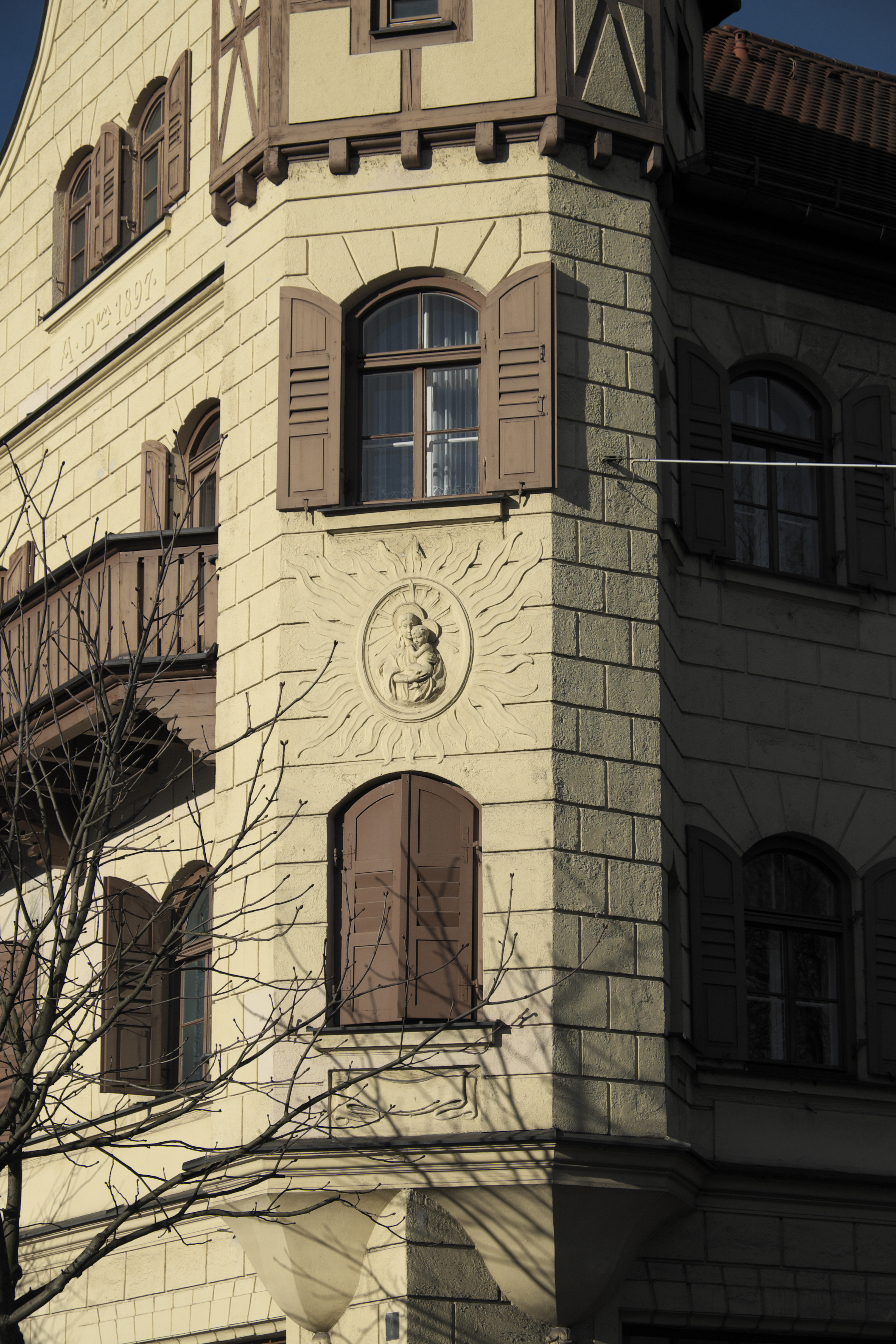 Villa in der Alten Allee 2 in Pasing im Stadtbezirk Pasing-Obermenzing in München (Bayern/Deutschland), Madonna mit Kind am Erkerturm